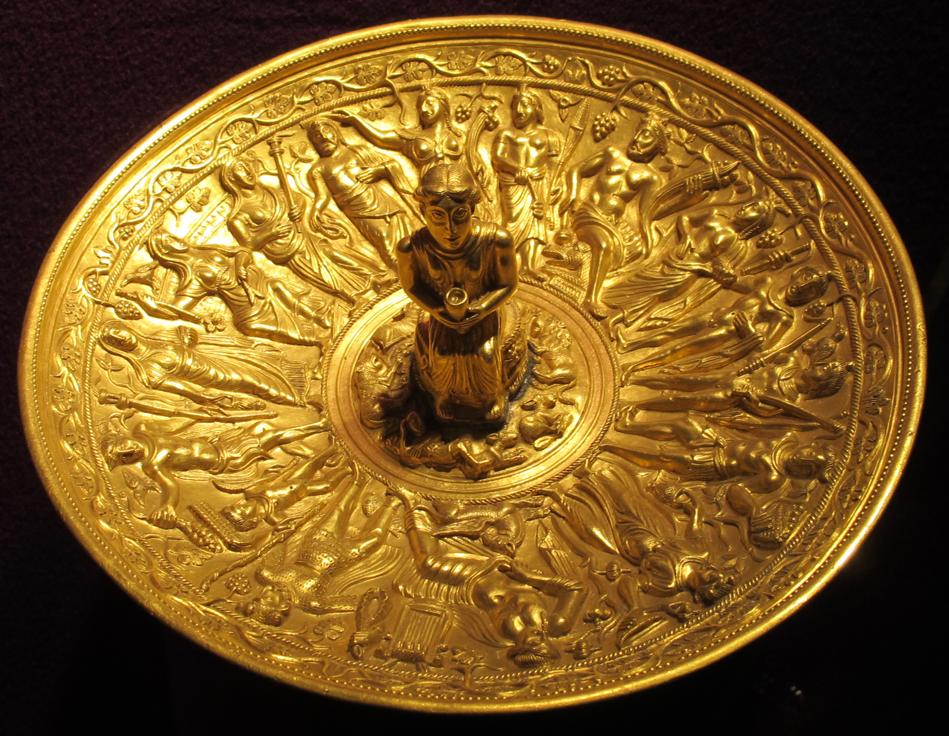 Tesoro di pietroasele, patera, IV-V sec